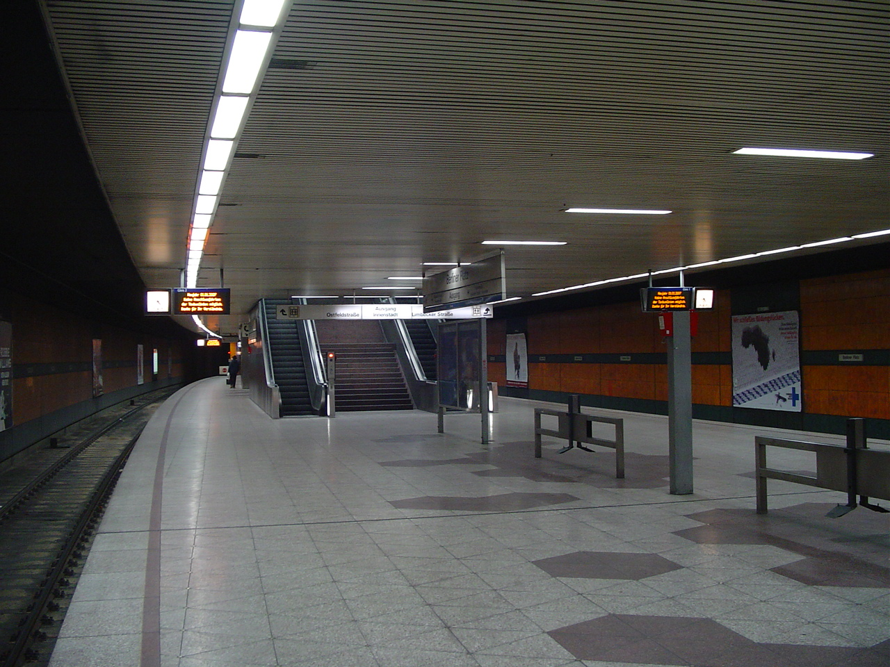 Essen Stadtbahn